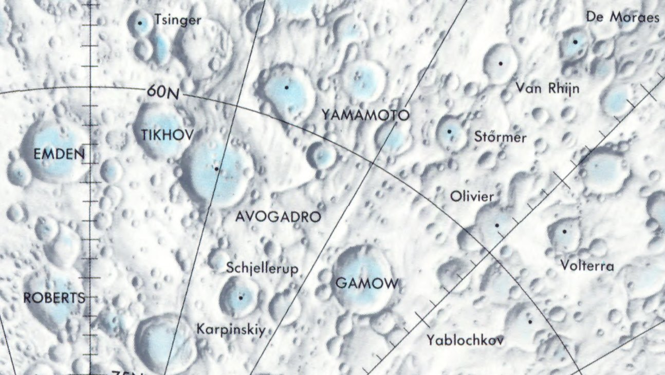 Cráter lunar Störmer. Localización. (Lunar Chart LPC1. Second Edition)